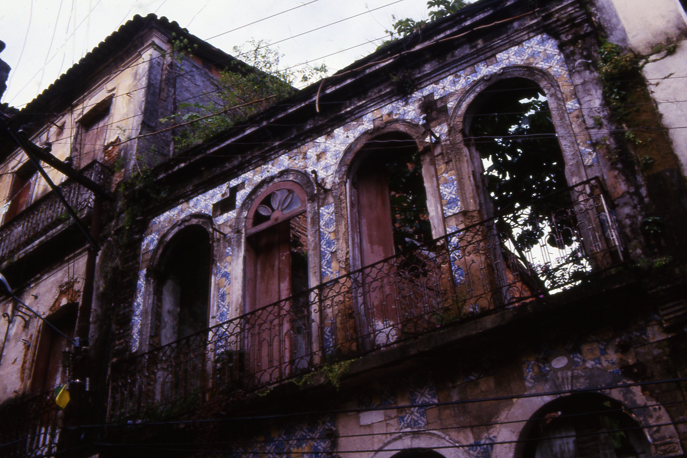 Bra574